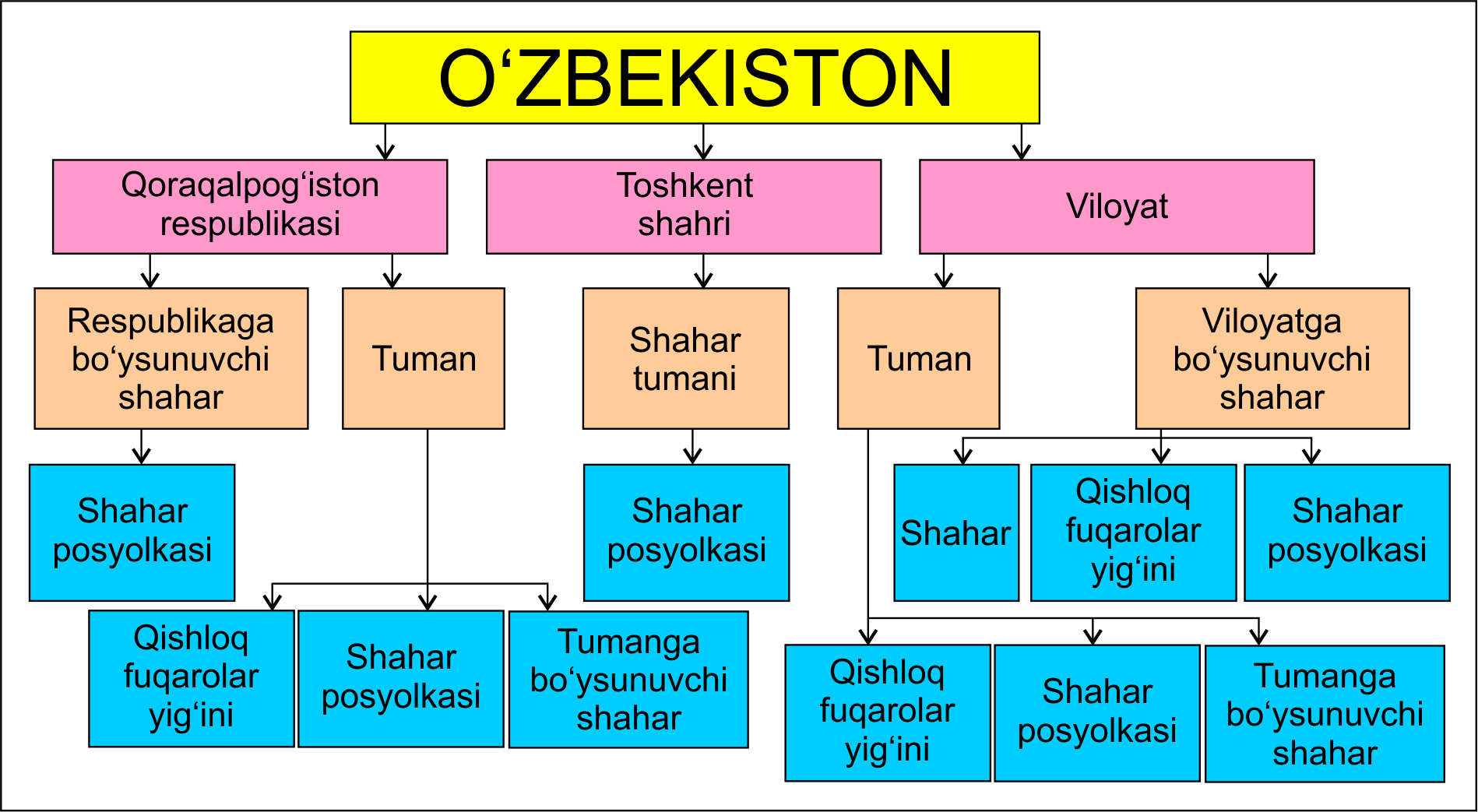 Схема АДТ Узбекистана